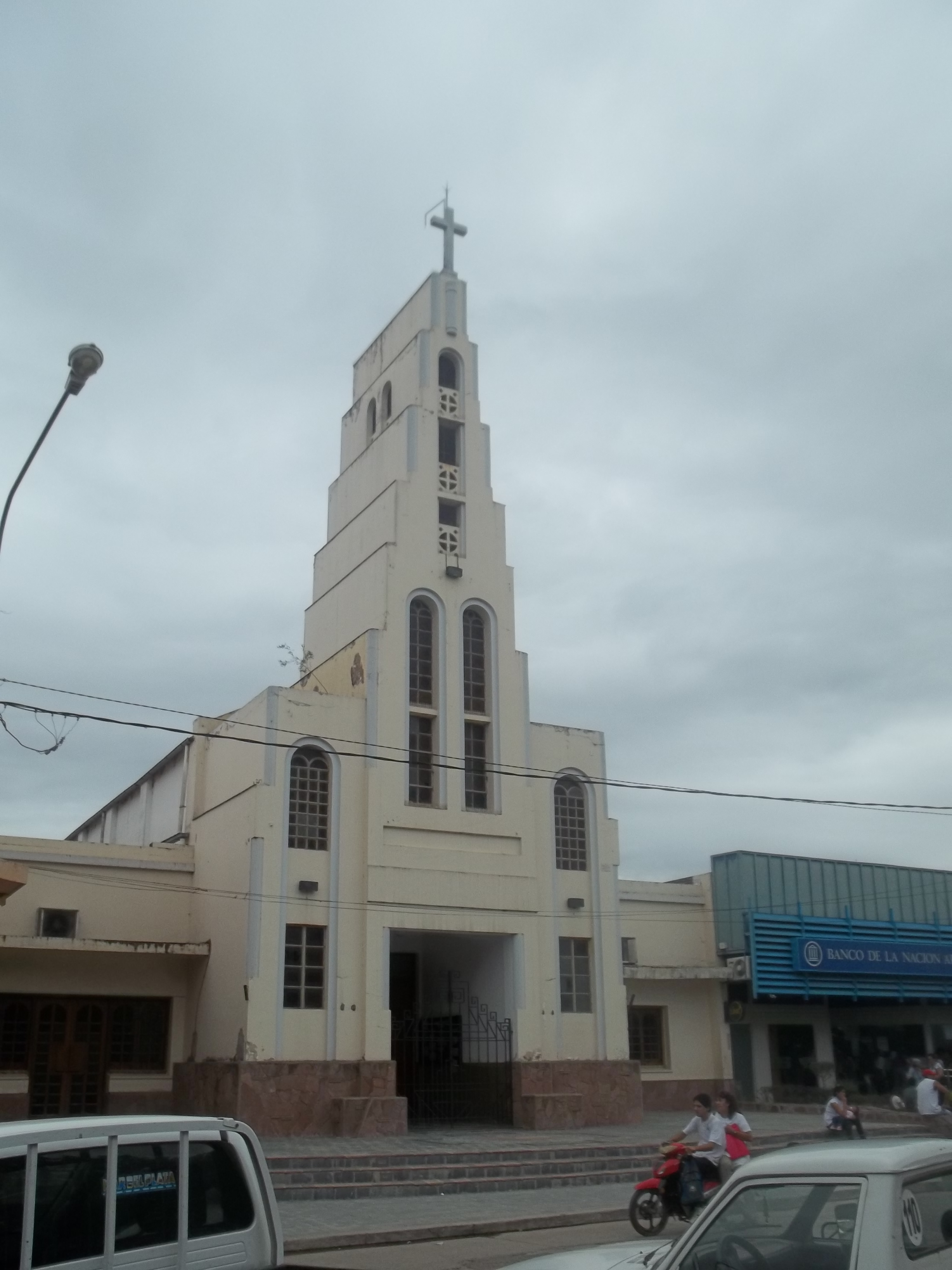 Parroquia del Sagrado Corazón de Jesús, principal templo católico de Libertador General San Martín, Jujuy, Argentina, frente a la Plaza San Martín.